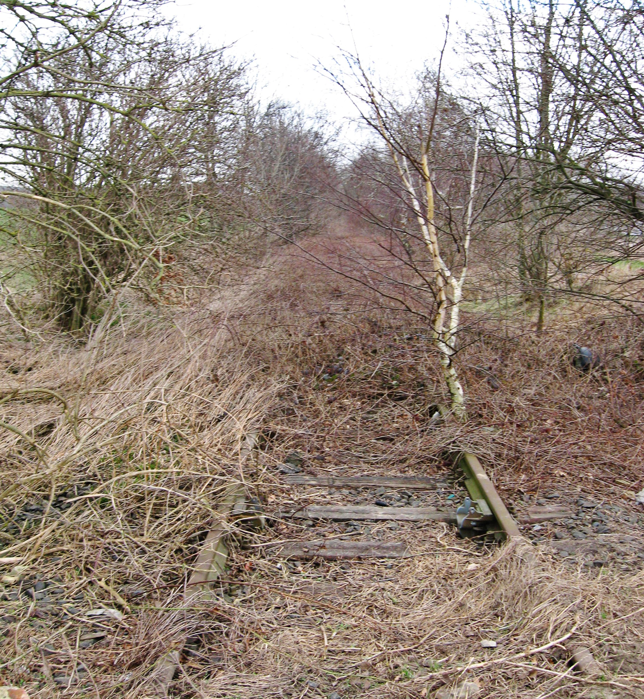 Zugewucherte Bahnstrecke vor der Kommende Siersdorf